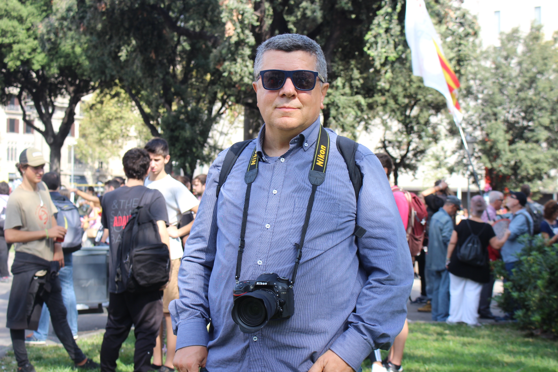 Xavier Rius Sant és un periodista freelance i escriptor català, especialitzat en temàtiques de drets humans, conflictes internacionals, món àrab, immigració, ultradreta i terrorisme.